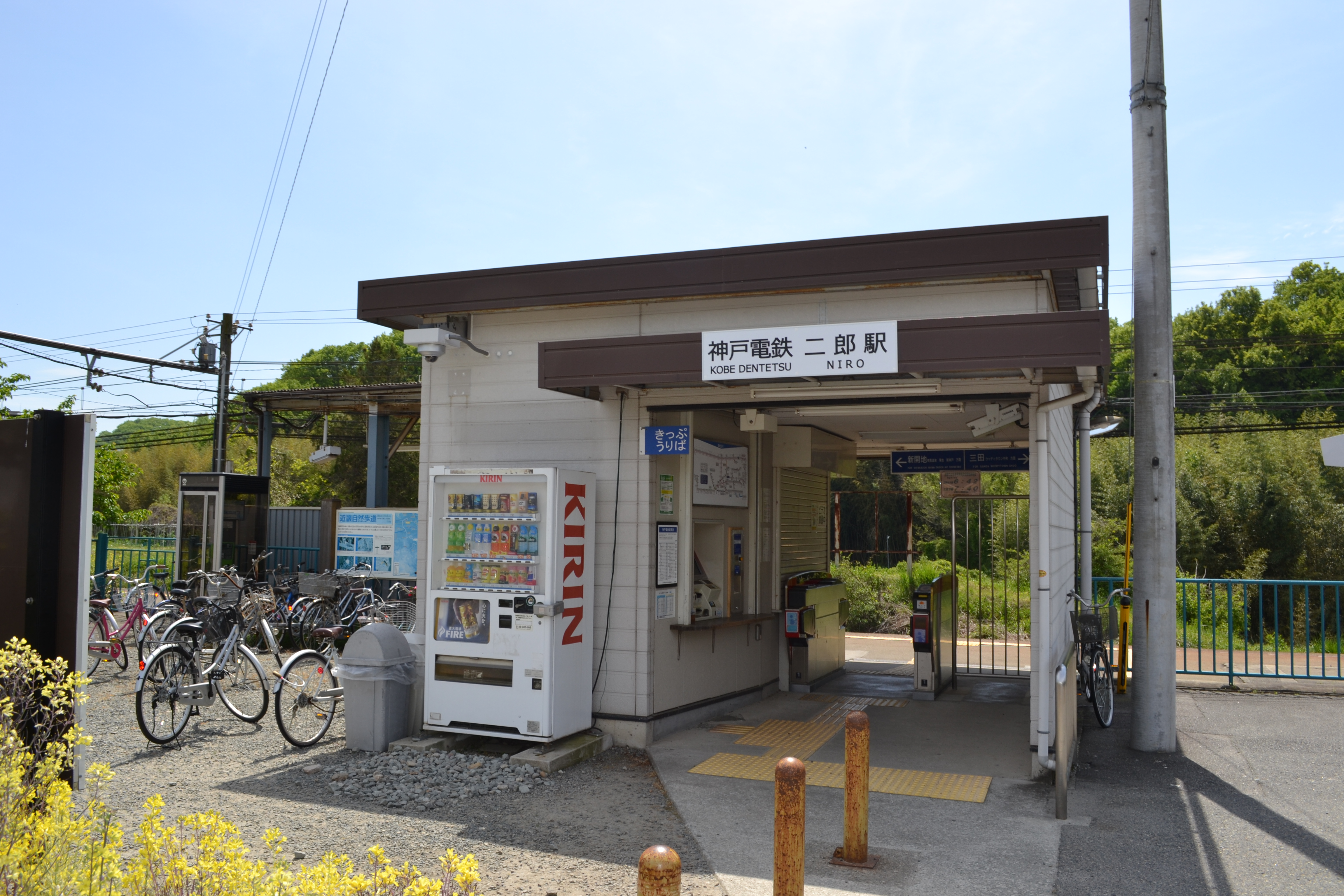 神戸電鉄二郎駅